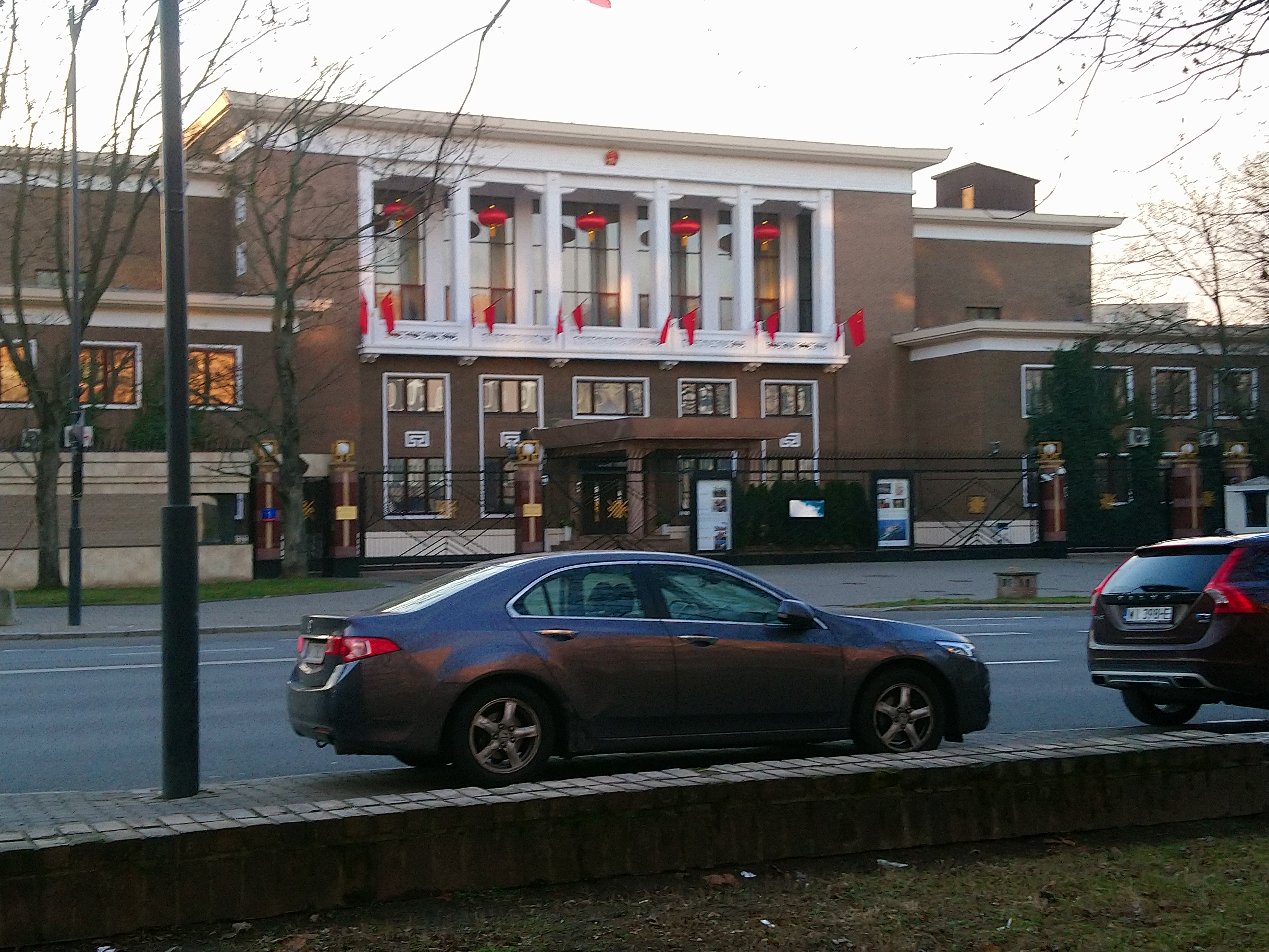 Ambasada Chińskiej Republiki Ludowej w Warszawie